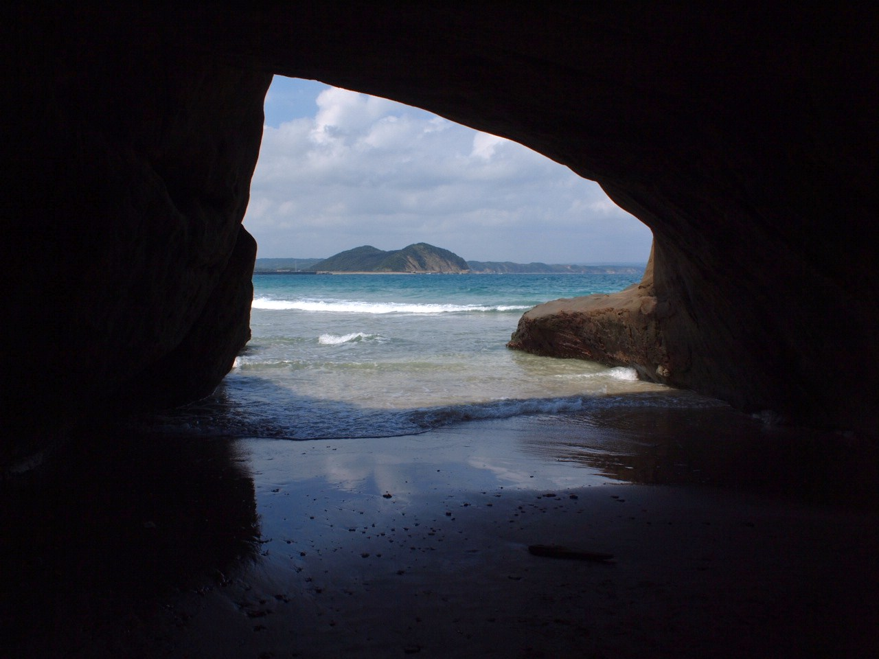 種子島南種子町東岸にある「千座の岩屋」内部